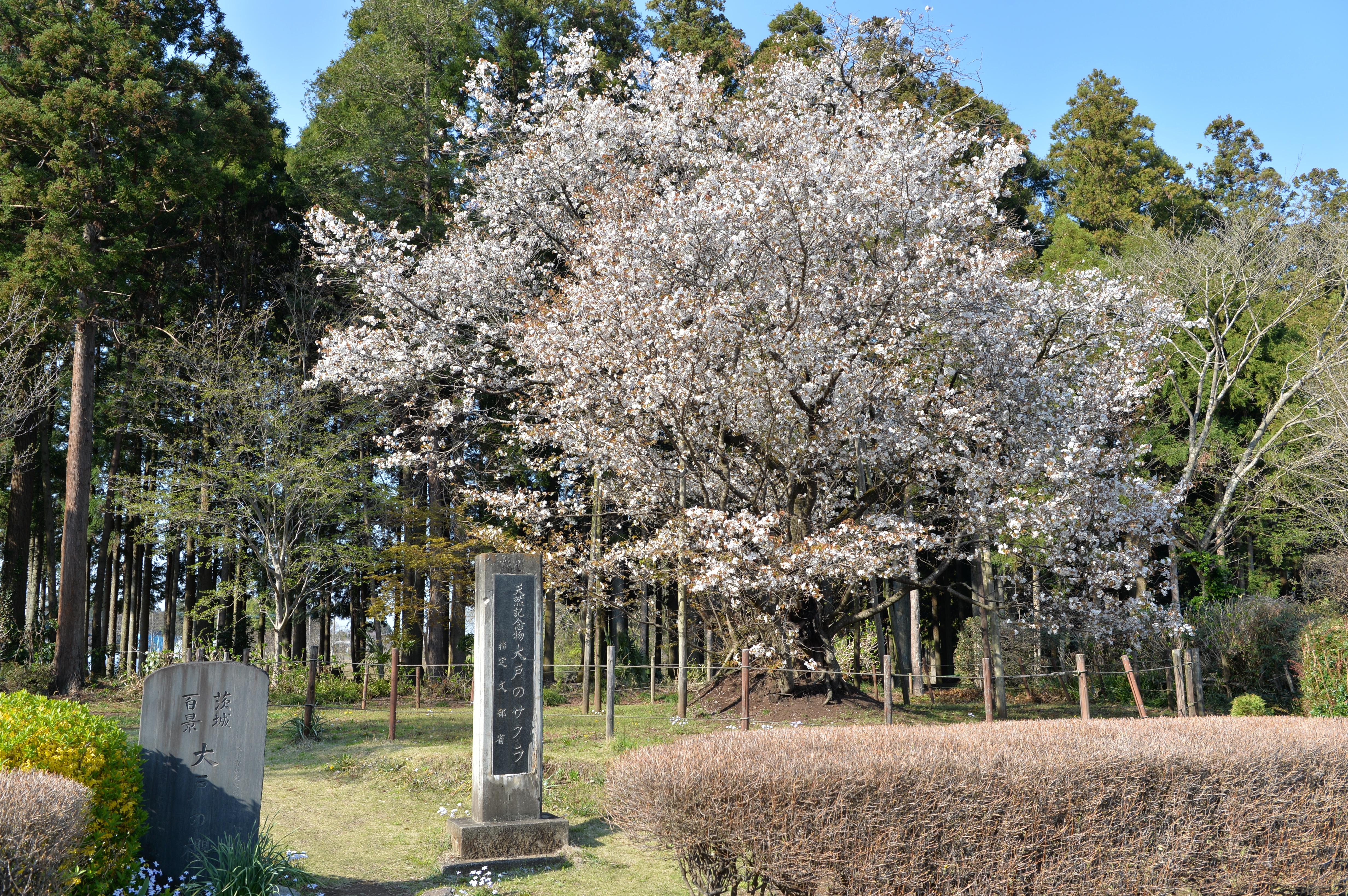 茨城県茨城町大戸の「大戸のサクラ」。国の天然記念物に指定されている。また、茨城百景「涸沼」の景勝地の一つでもある。